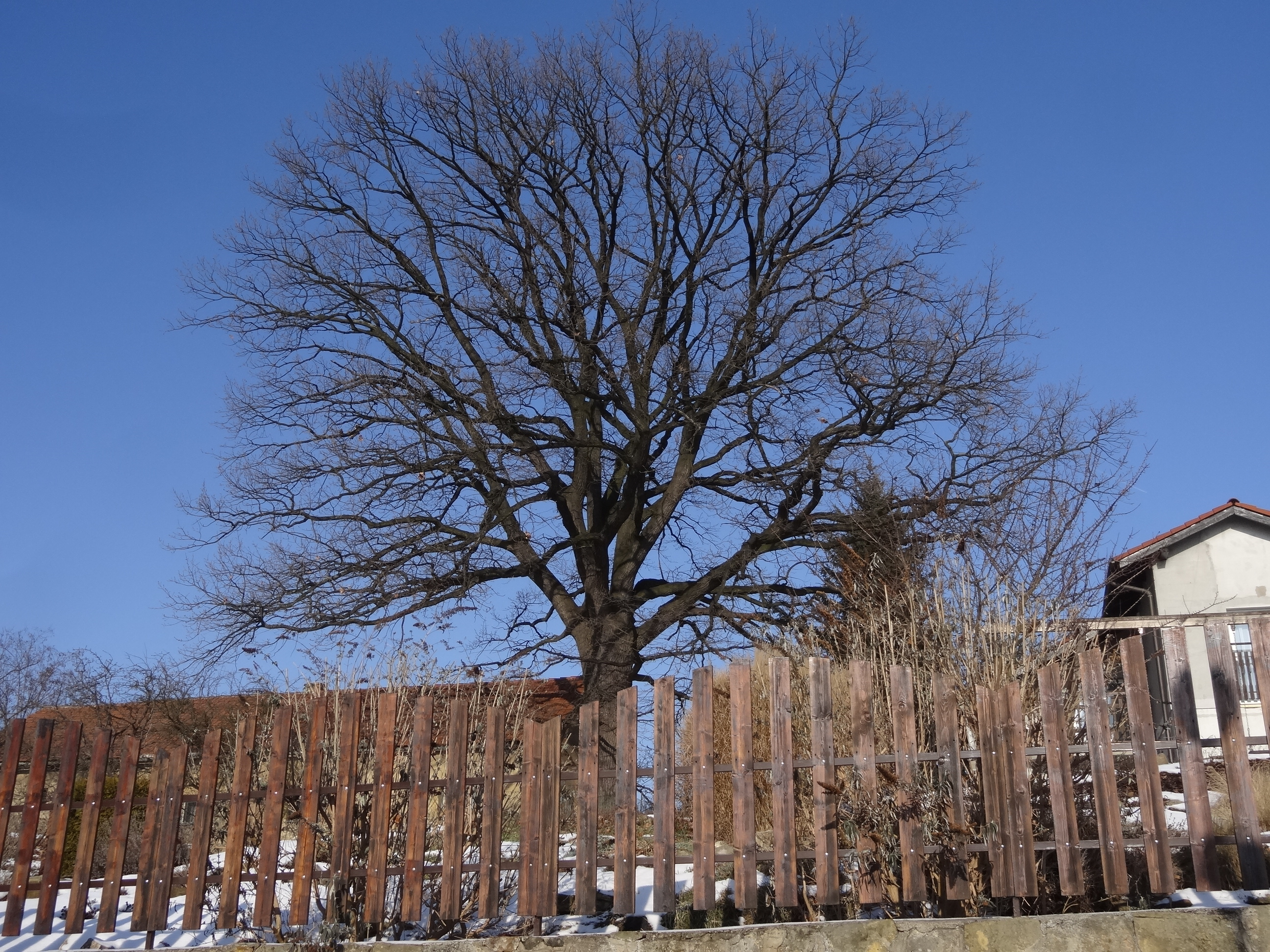 Chvaly - památný dub letní na pozemku domu čp. 907 v Ledkovské ulici